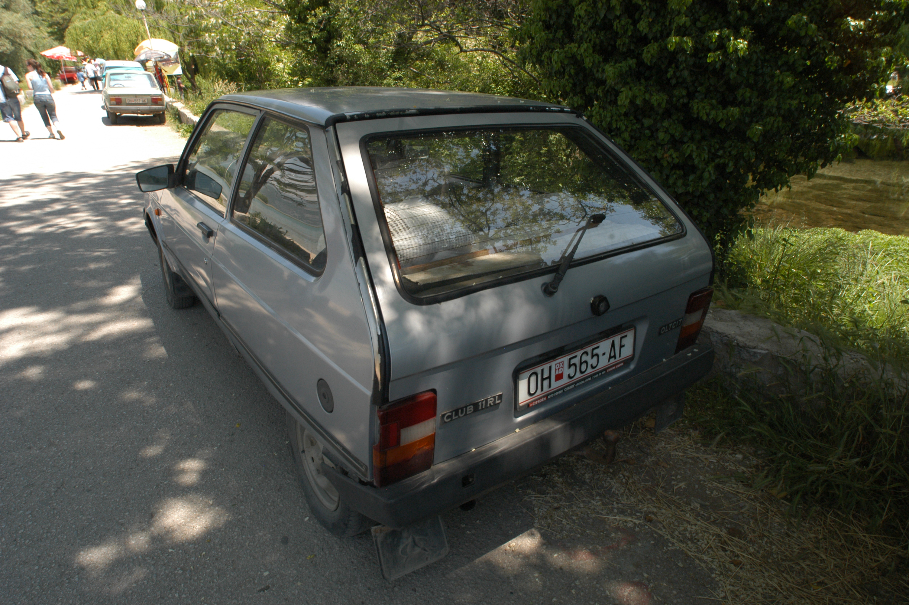 Oltcit Club 11 RL